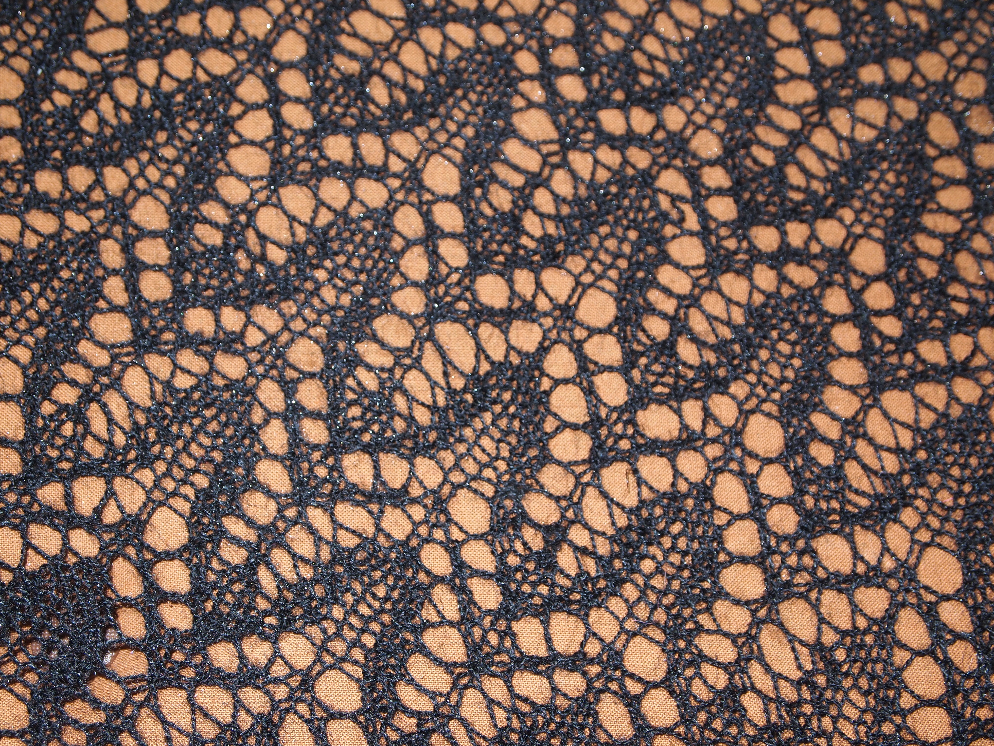 Jääkukka for Teija